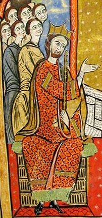 Alfonso II de Aragón. Detalle de la portada del Liber feudorum maior (siglo XIII).